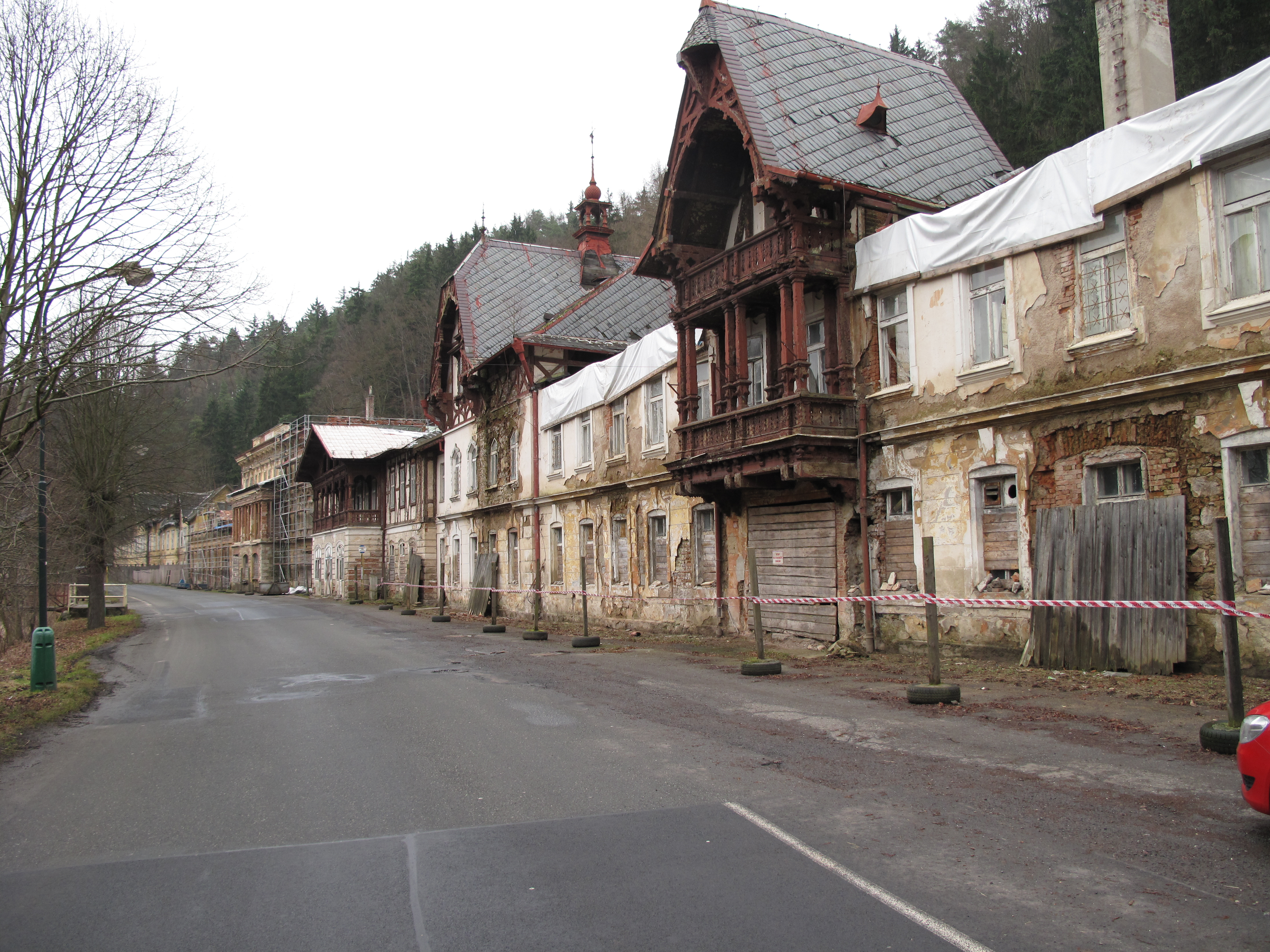 Kyselka. Okres Karlovy Vary, Česká republika.